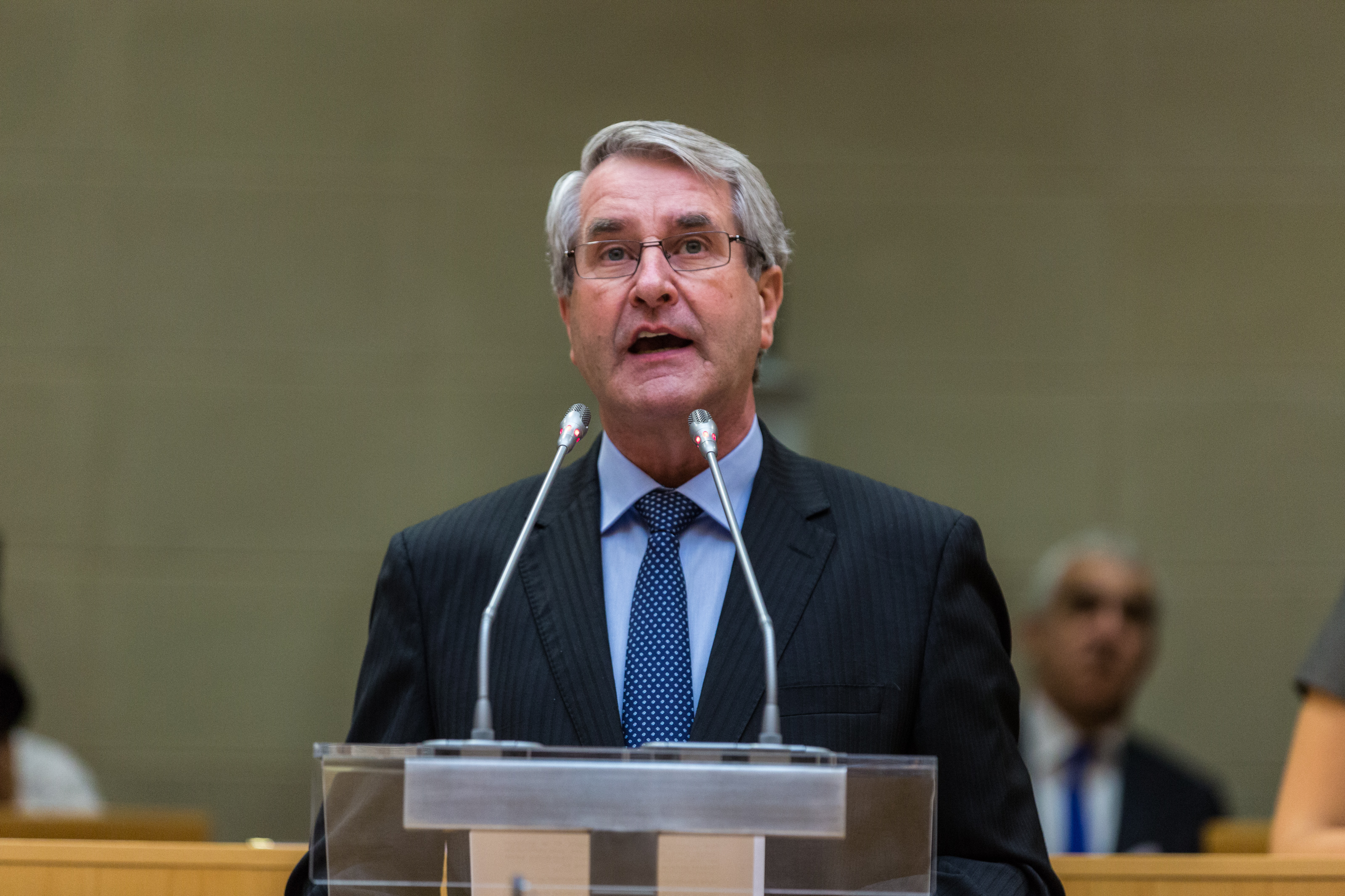 Philippe Richert au cours de son discours d'investiture comme président de la région ACAL le 4 janvier 2016.